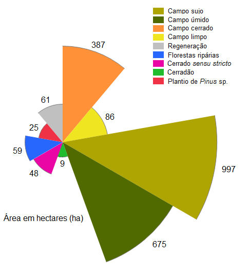 Diferentes tipos de fisionomias de Cerrado que ocorrem na ESEC Itirapina e sua respectiva área de abrangência (em hectares)